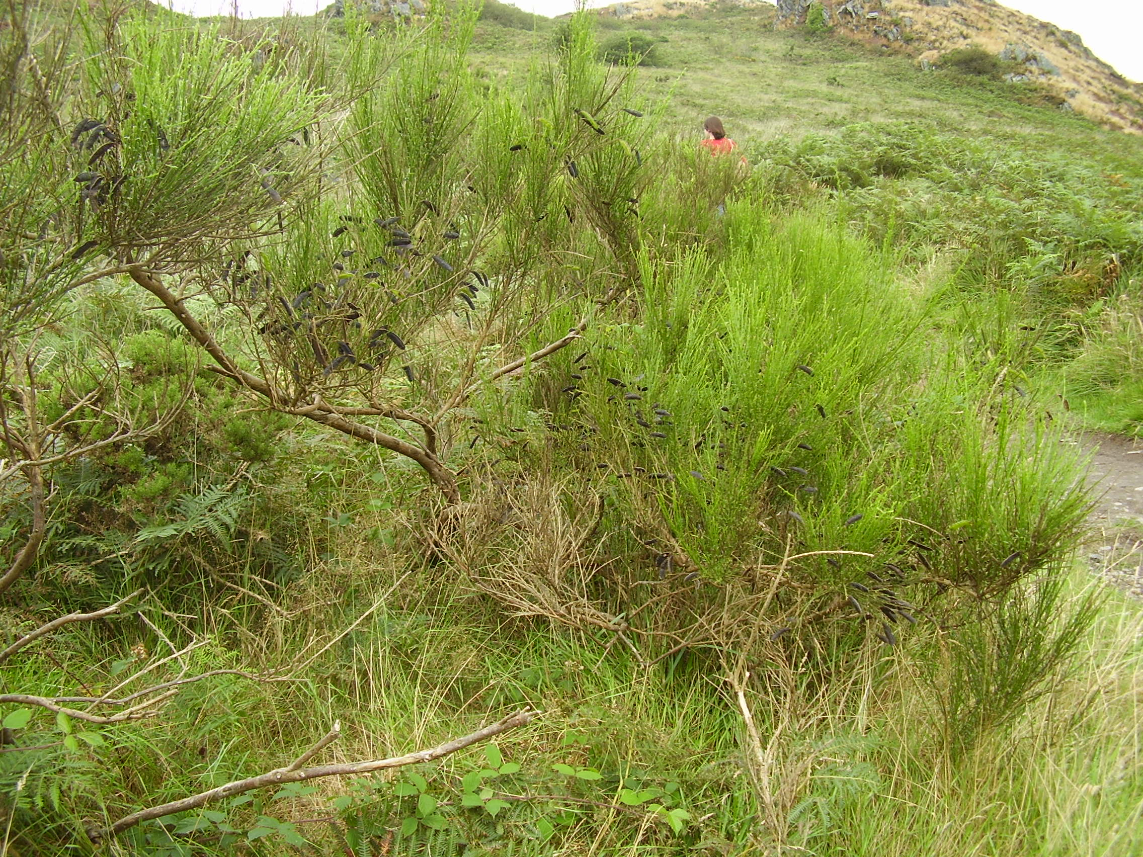 Plounéour-Ménez, Roc'h Trevezel, Bretagne; Frankreich